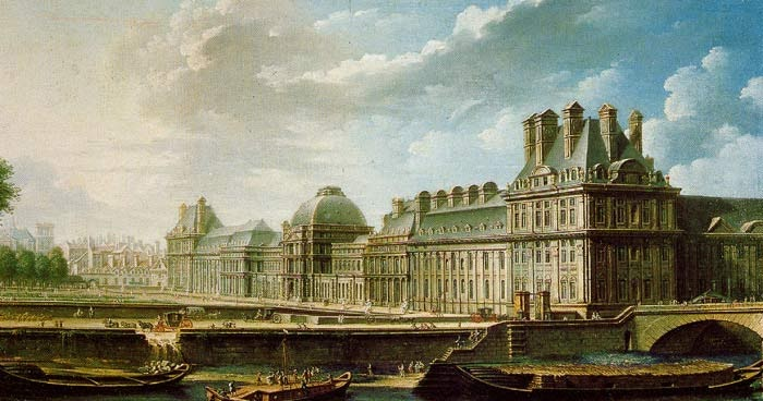 Le Palais des Tuileries vu du Quai d'Orsay, par Nicolas-Jean-Baptiste Raguenet, vers 1757